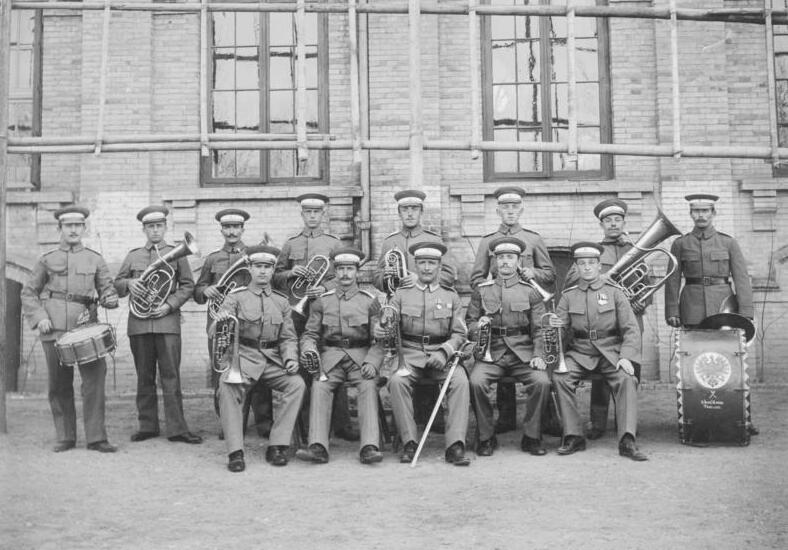 China, Tientsin Musik der 4. beritt. Comp., Tientsin